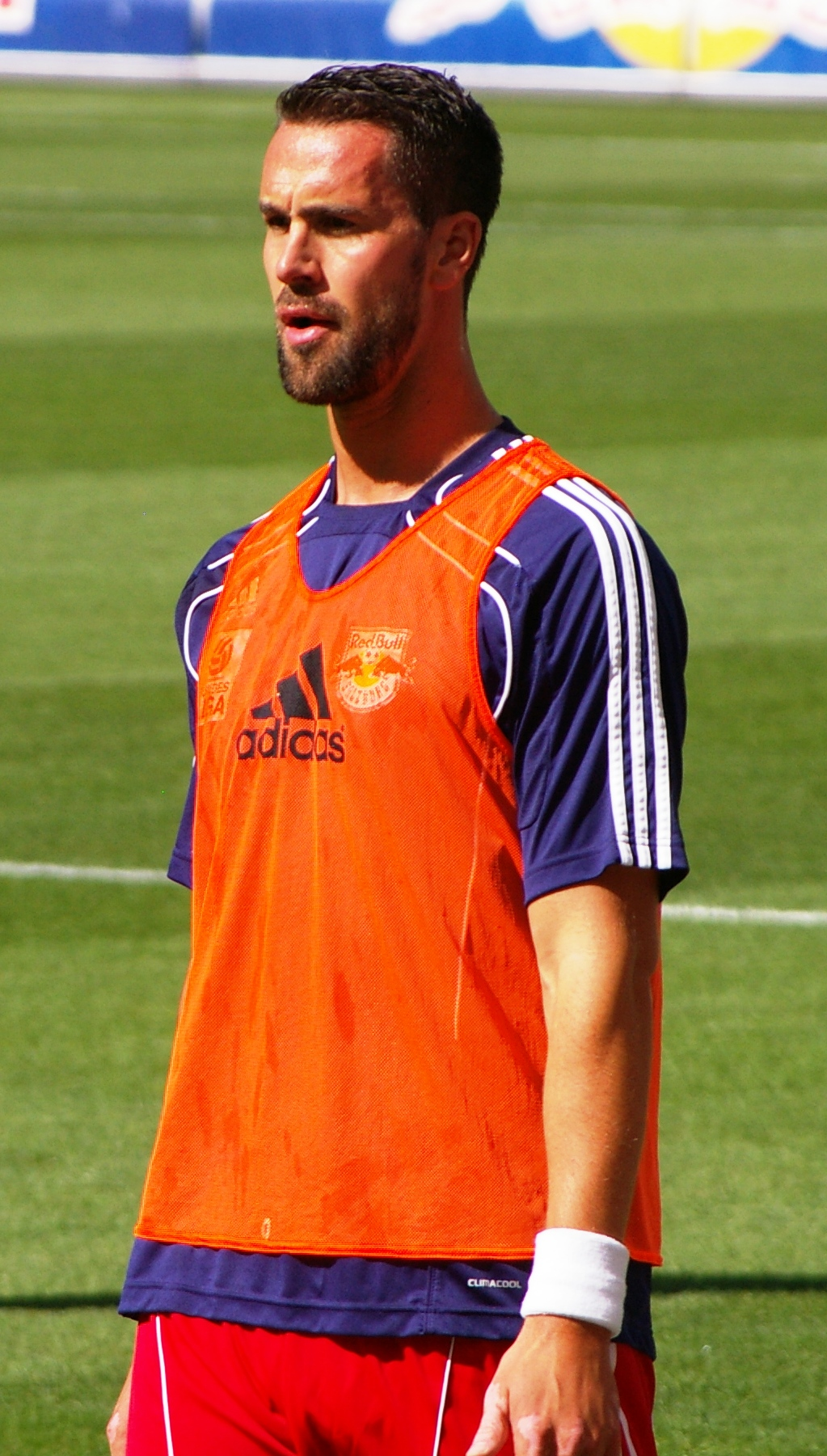 StürmerRed Bull Salzburg